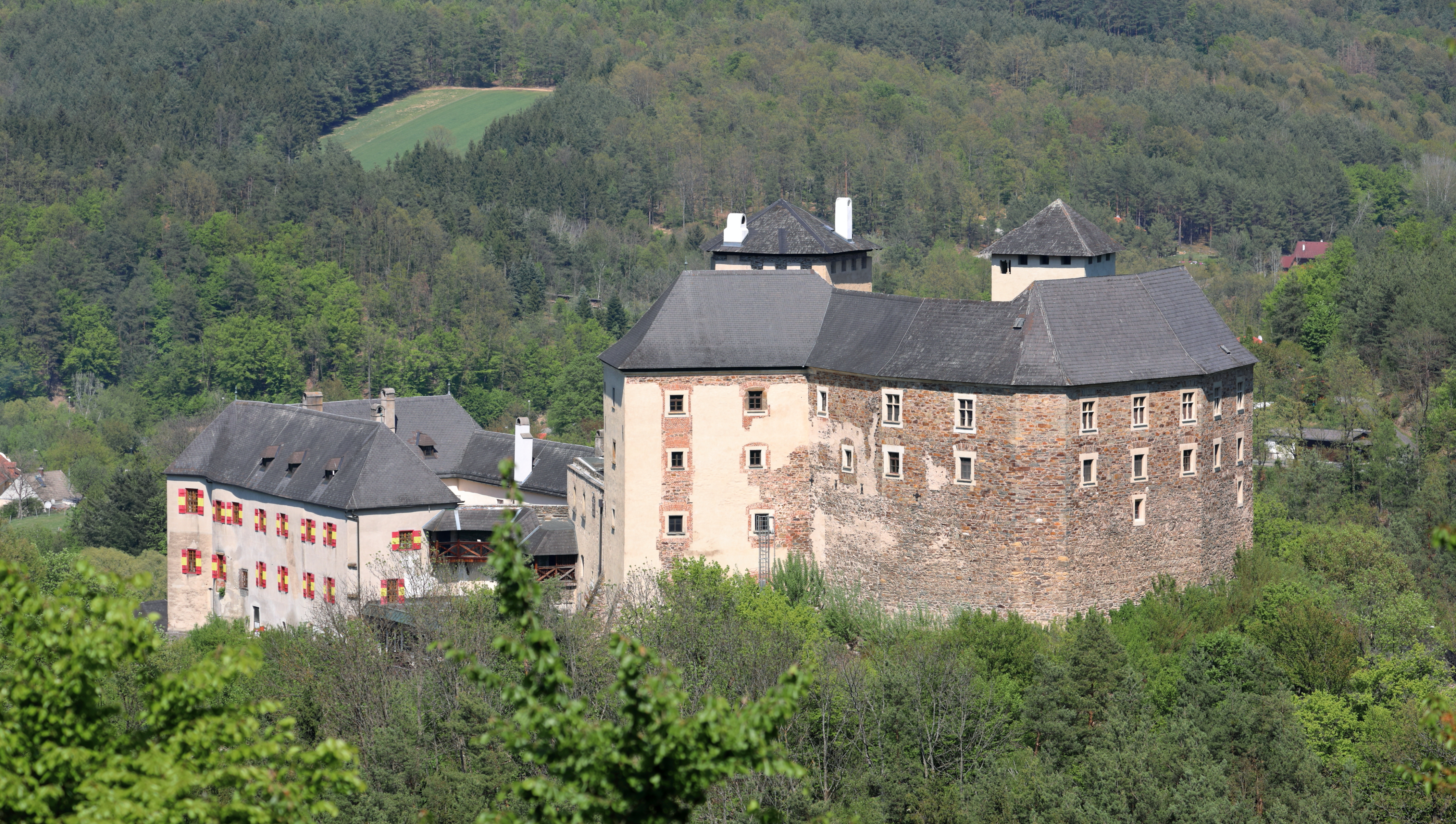 Südwestansicht der Burg in der burgenländischen Marktgemeinde Lockenhaus.